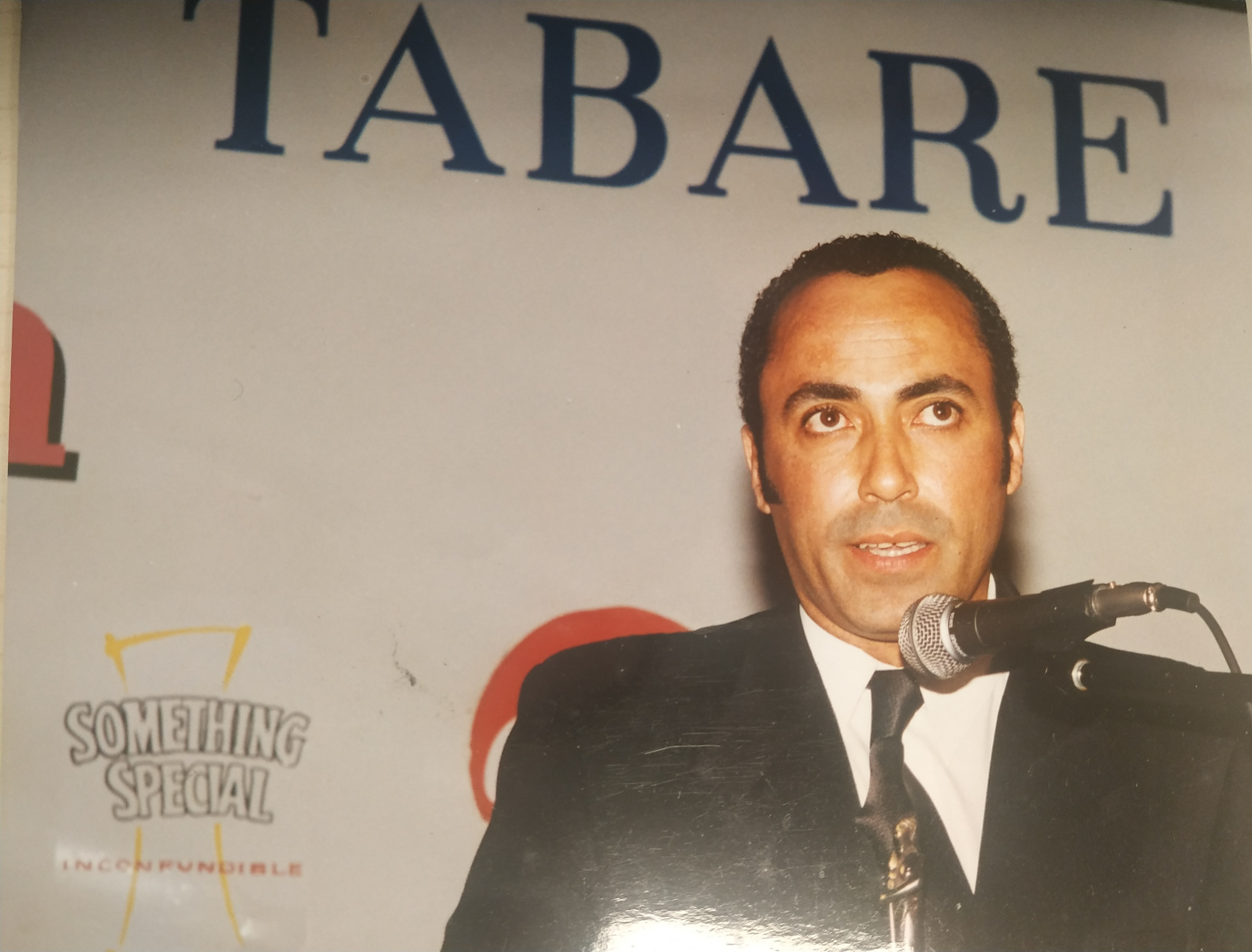 Rodolfo Pereyra ricibiendo premio Tabaré por Deporte Total